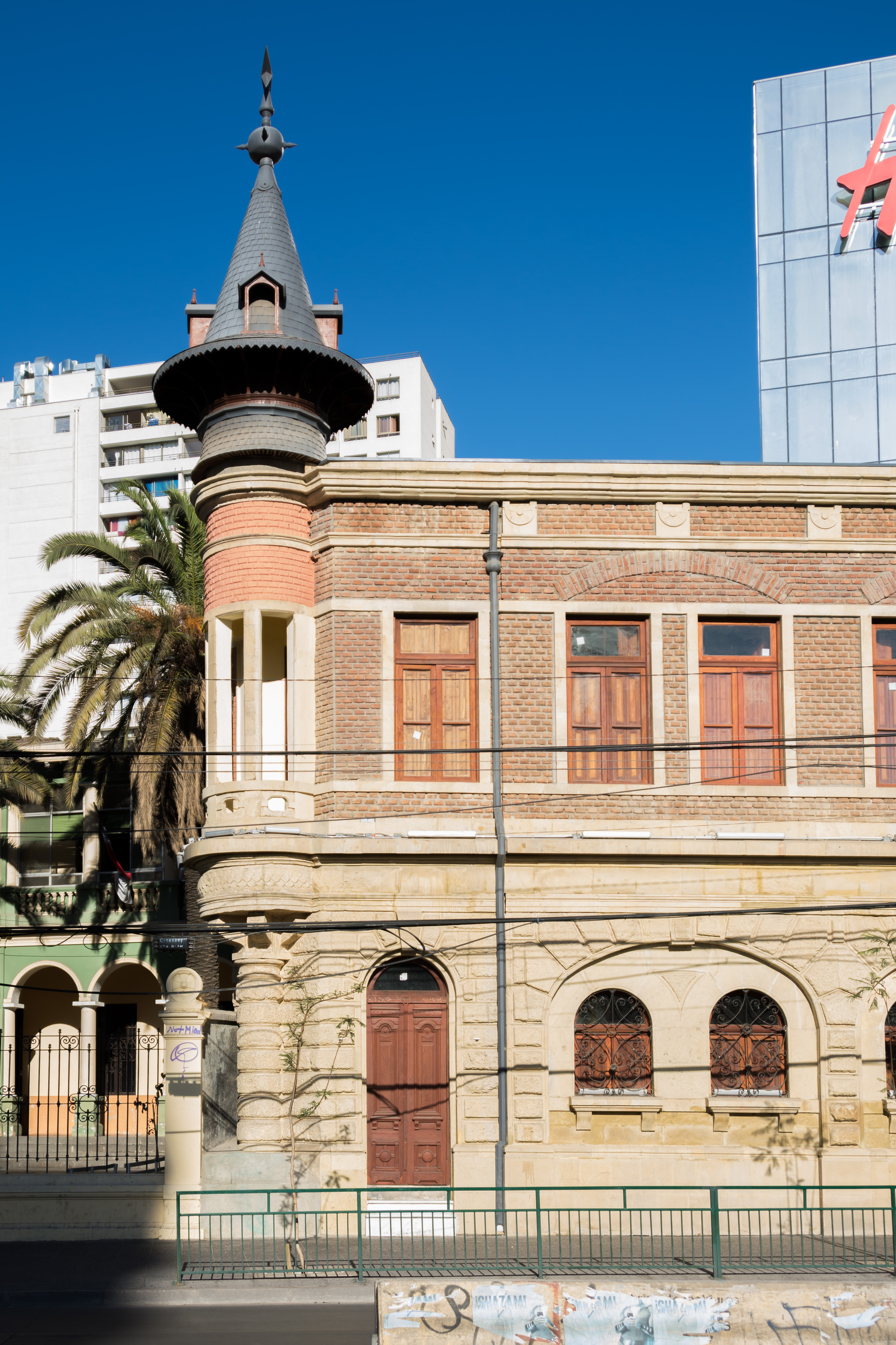 Cervecería Ebner, Santiago, Región Metropolitana de Santiago, Chile